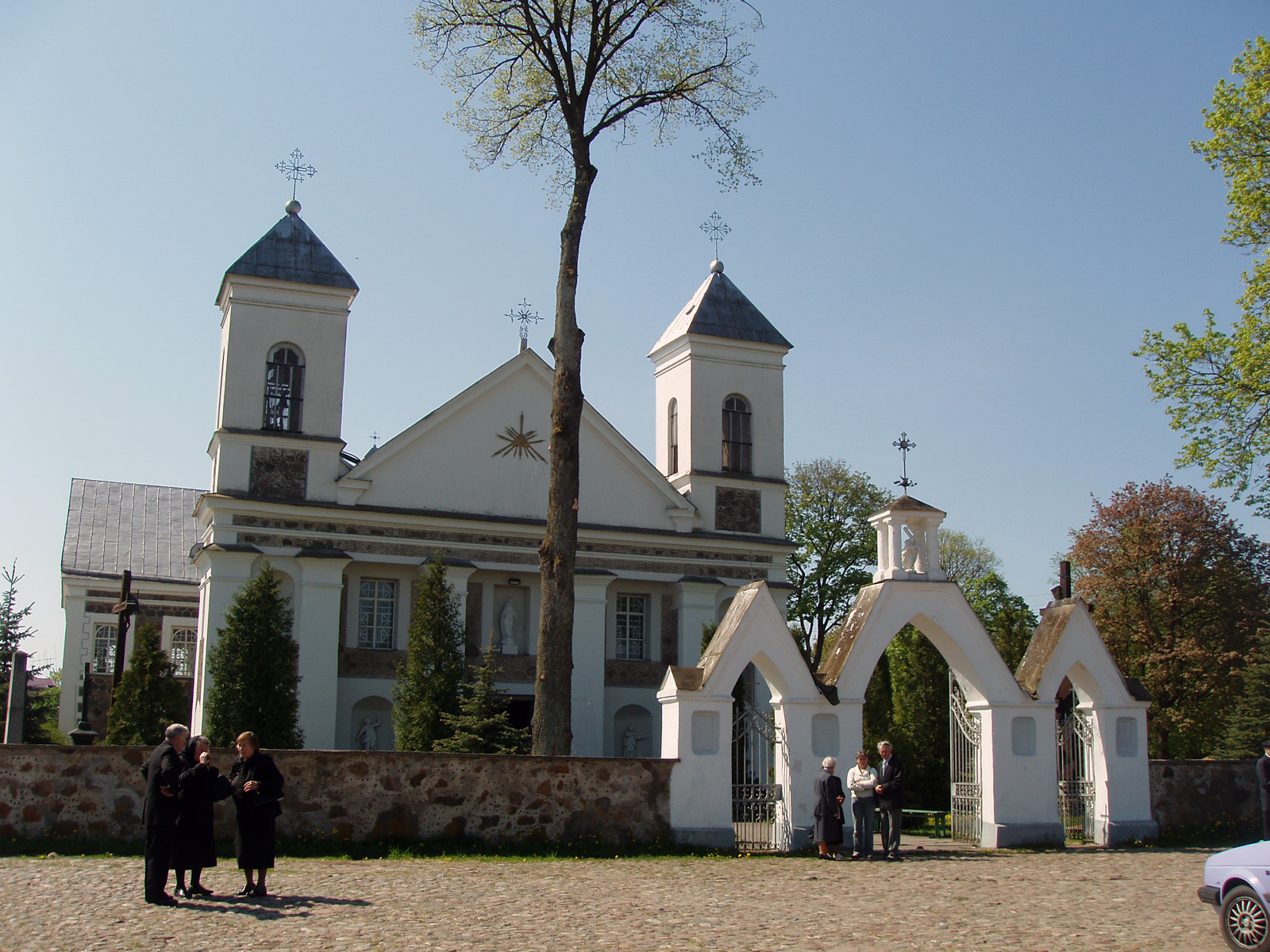 Church of Valkininkai, Dzukija, Lithuania